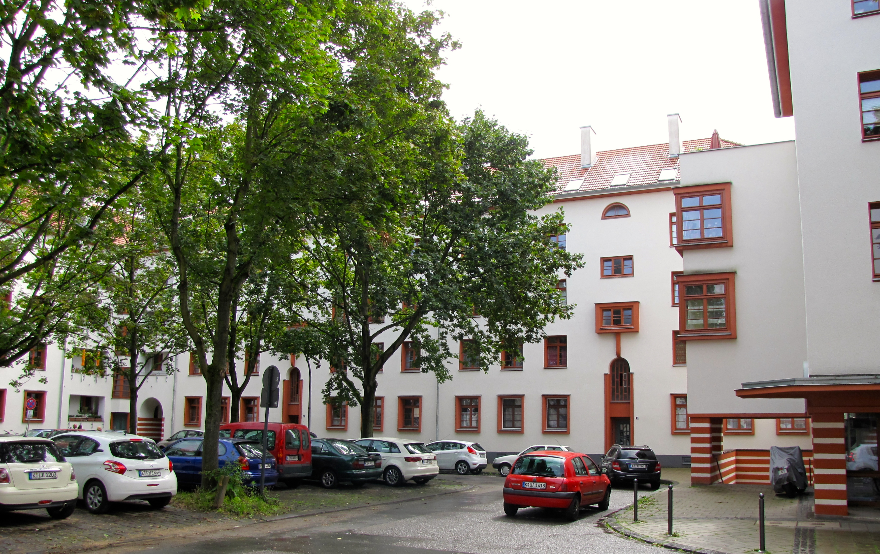 Köln Riehl: Naumannsiedlung, erbaut 1926 - 1930